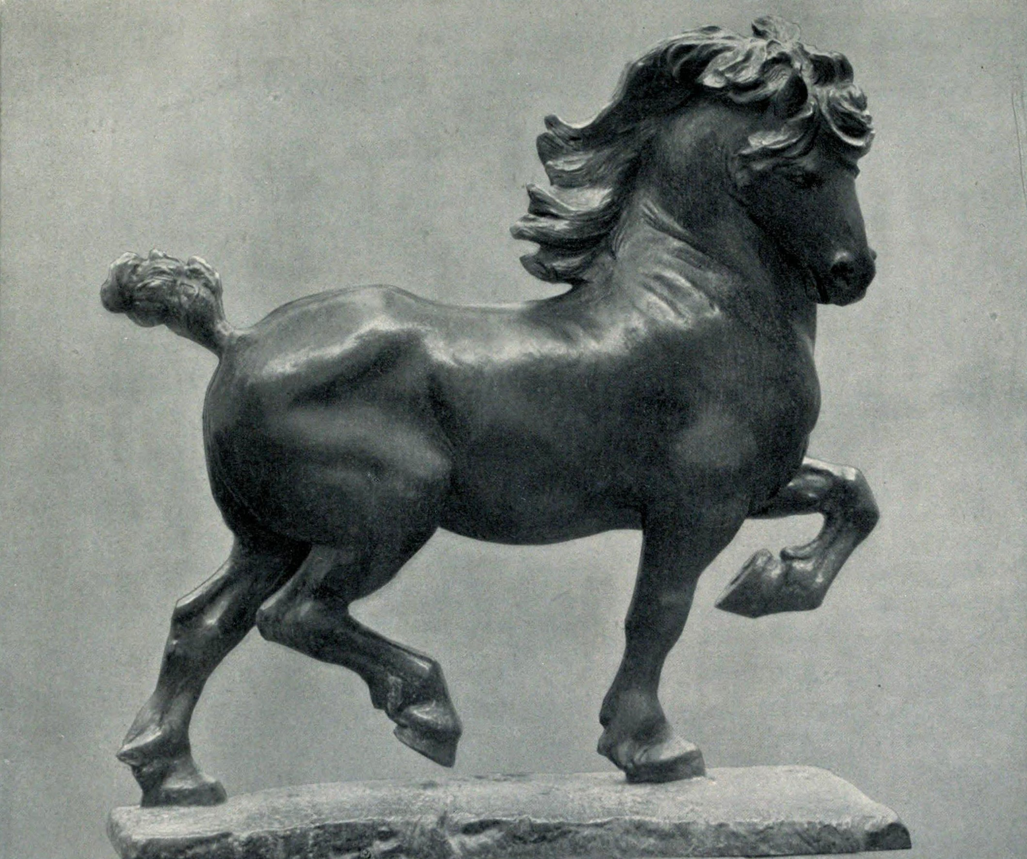 Brabanter Pferd